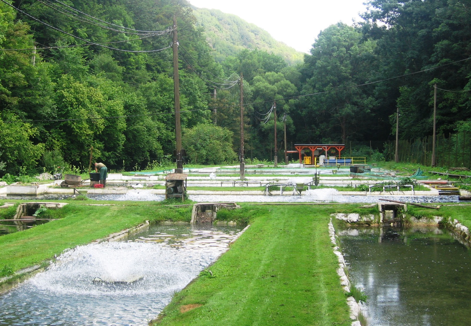 A Lillafüred közelében lévő pisztrángtelep keltetőtavainak egy része